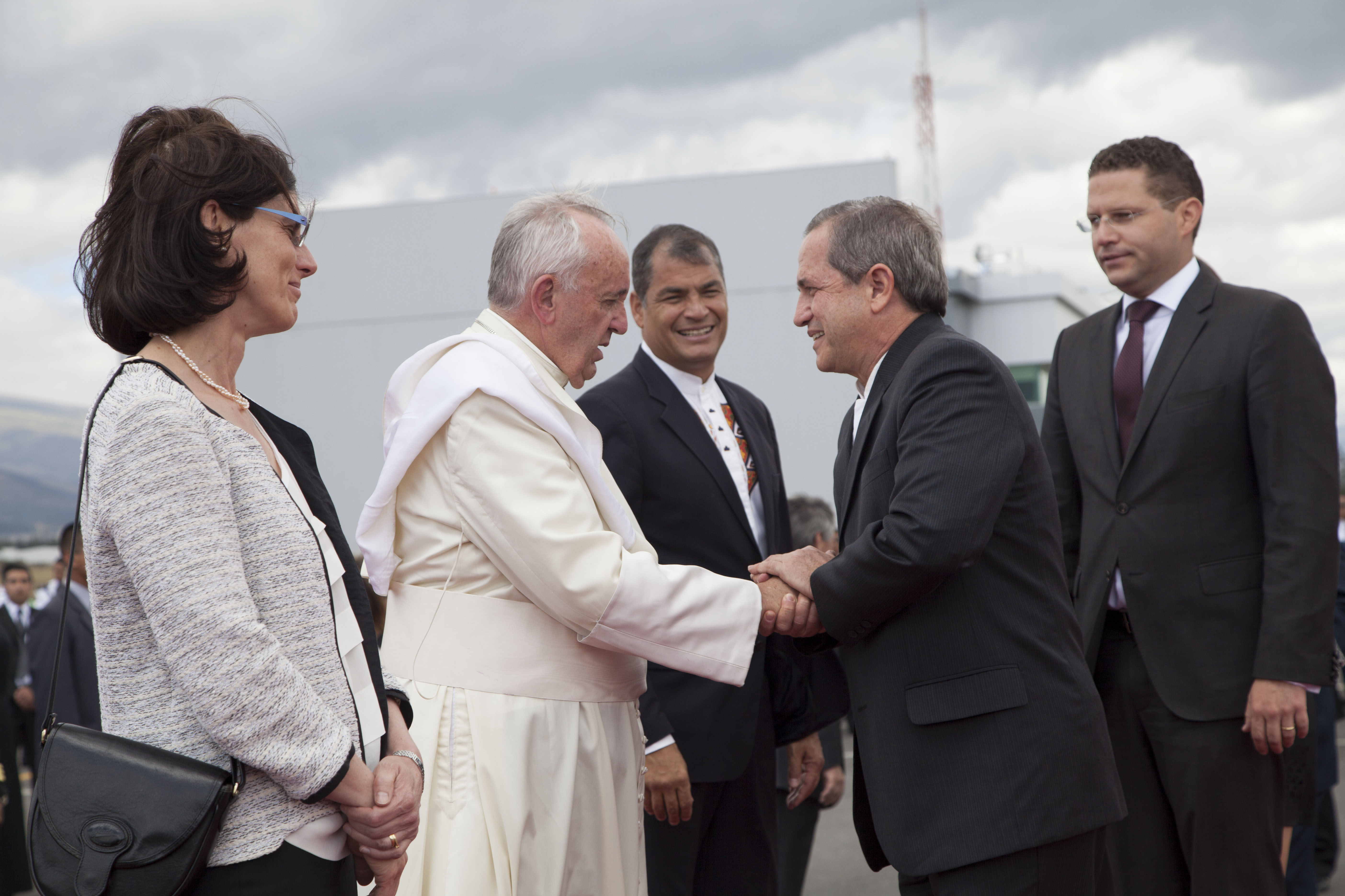 Quito, Ecuador 8 de julio de 2015. El presidente de3 la República, Rafael Correa junto a varias autoridades, despiden al Papa Francisco en el Aeropuerto Mariscal Sucre de Quito. Seguido de este acto, el Canciller Ricardo Patiño y autoridades eclesiásticas encabezadas por el Monseñor Fausto Trávez, Arzobispo de Quito ofrecen una rueda de prensa. Carlos Pozo Albán / Cancillería del Ecuador